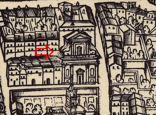 Pianta di Maggi